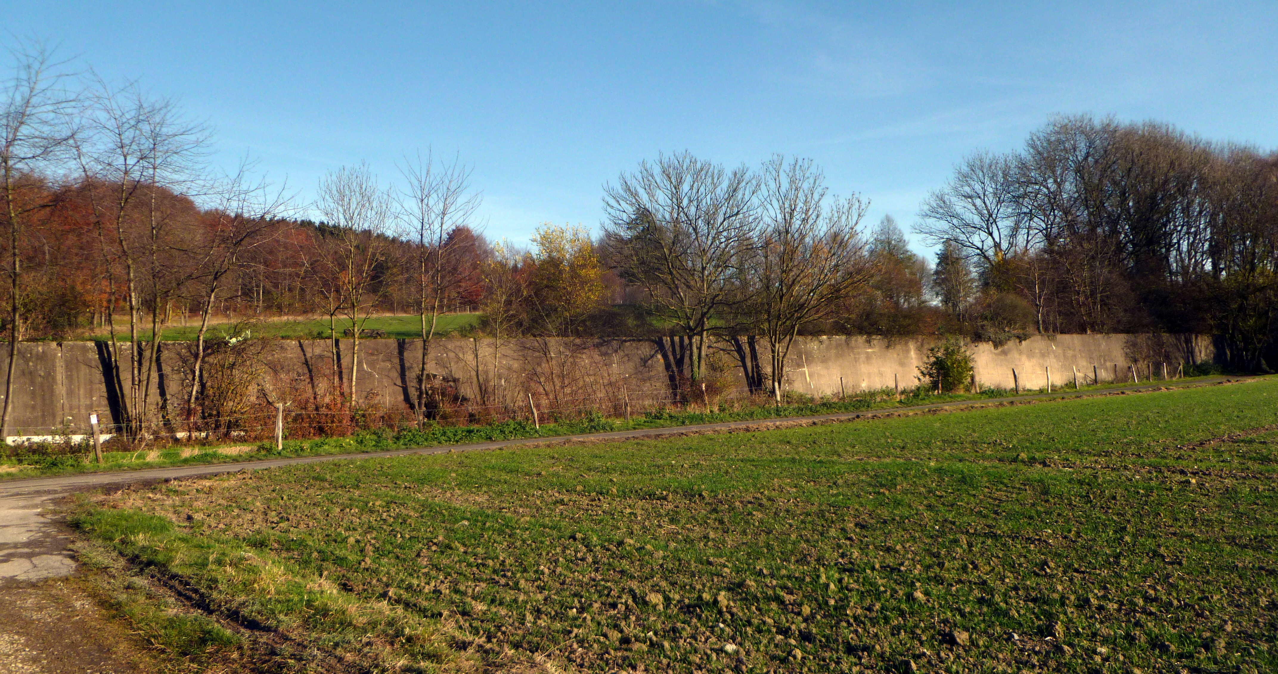 Baudenkmal in Aachen-Laurensberg; Teil des ehemaligen Westwalls